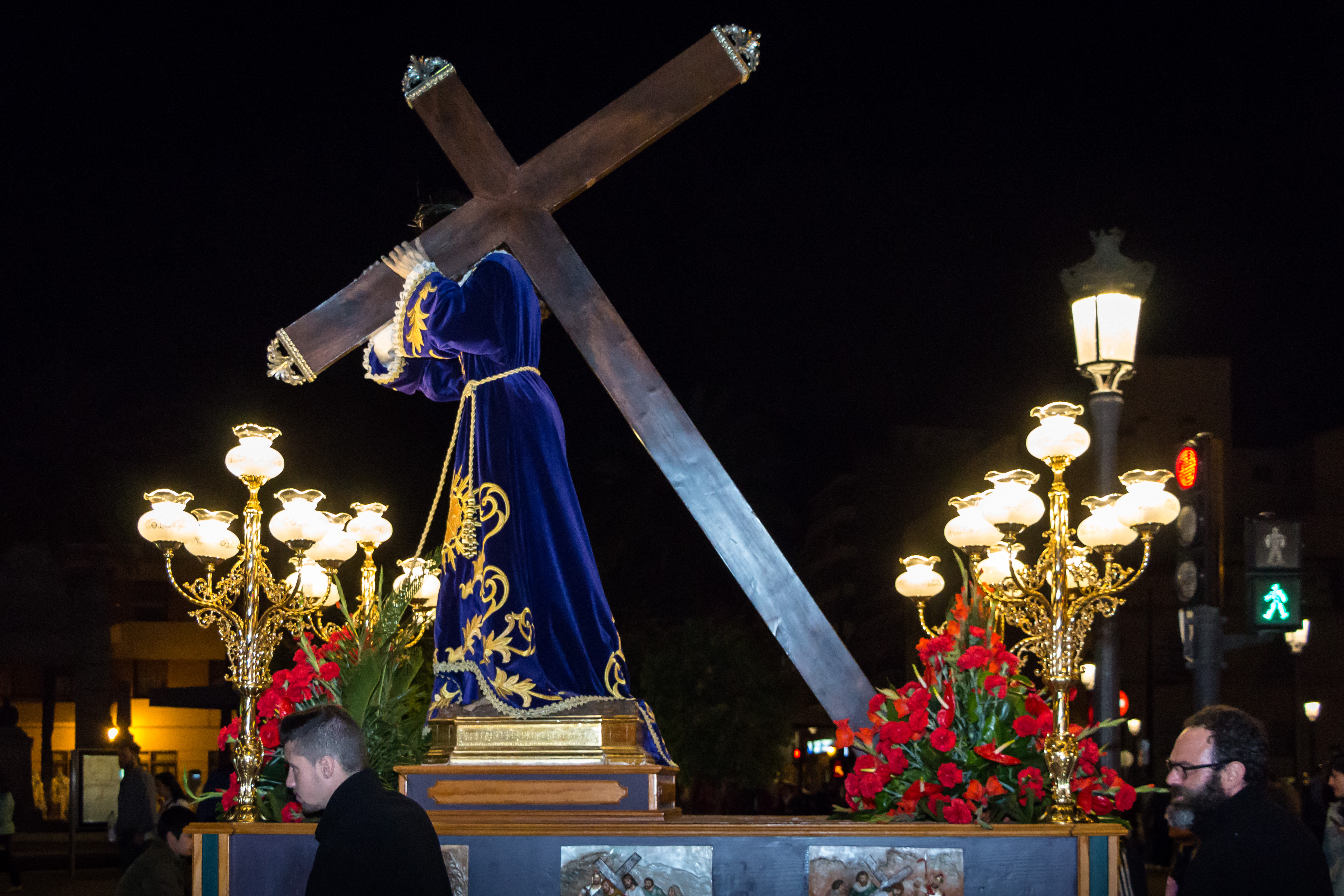 La Procesión del Santo Entierro de la Semana Santa Marinera tiene lugar la noche de Viernes Santo. This is a photography of a Folklore festival in Spain (Wikidata id Q9075846).